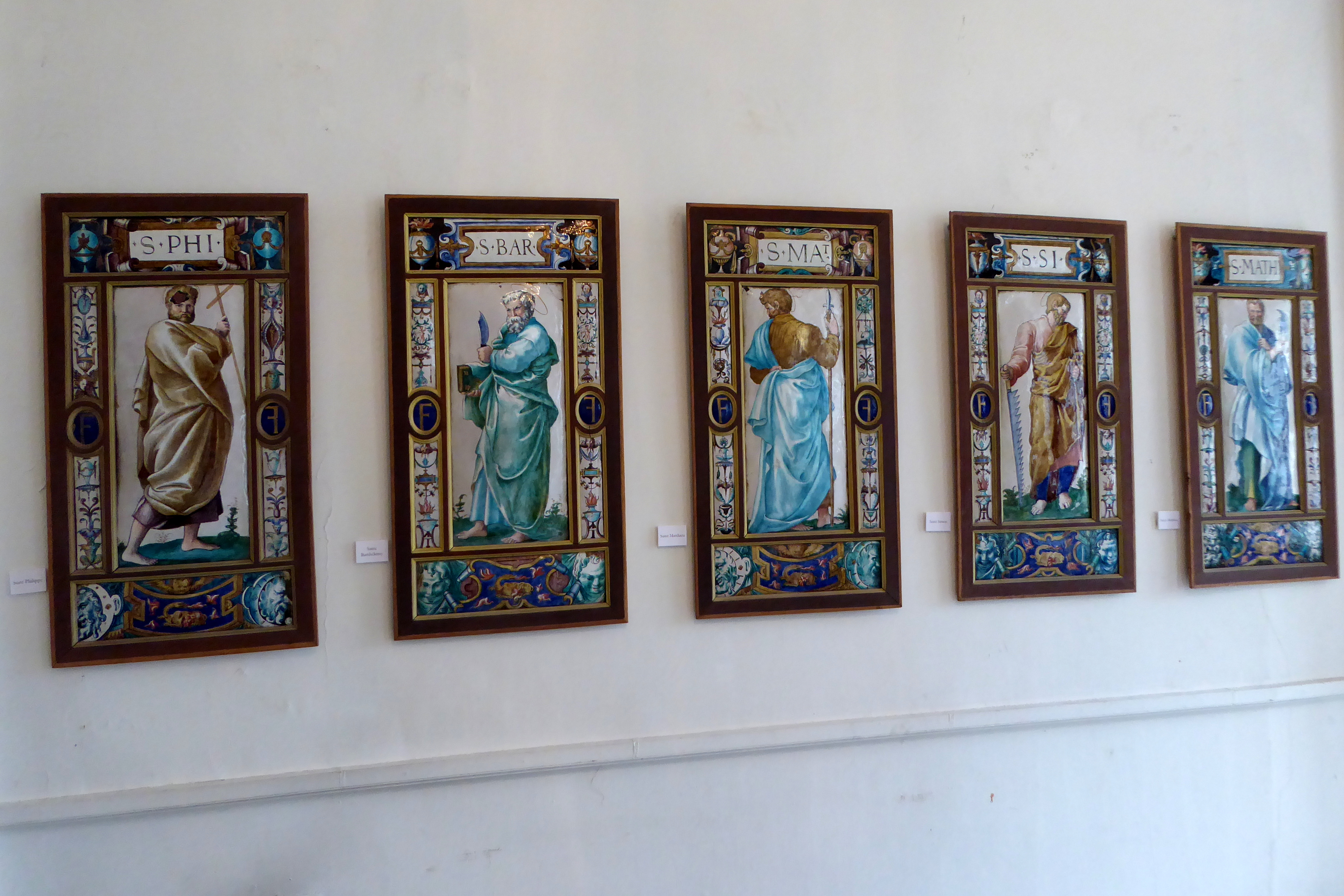 La série des 12 apôtres : Philippe, Barthélemy, Mathieu, Simon, Mathias - Émaux de Léonard Limosin, 1547, musée des beaux-arts de Chartres, Eure-et-Loir (France).